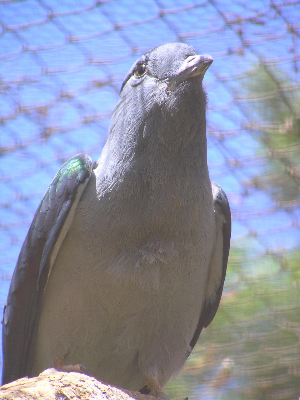 A cuckoo-roller